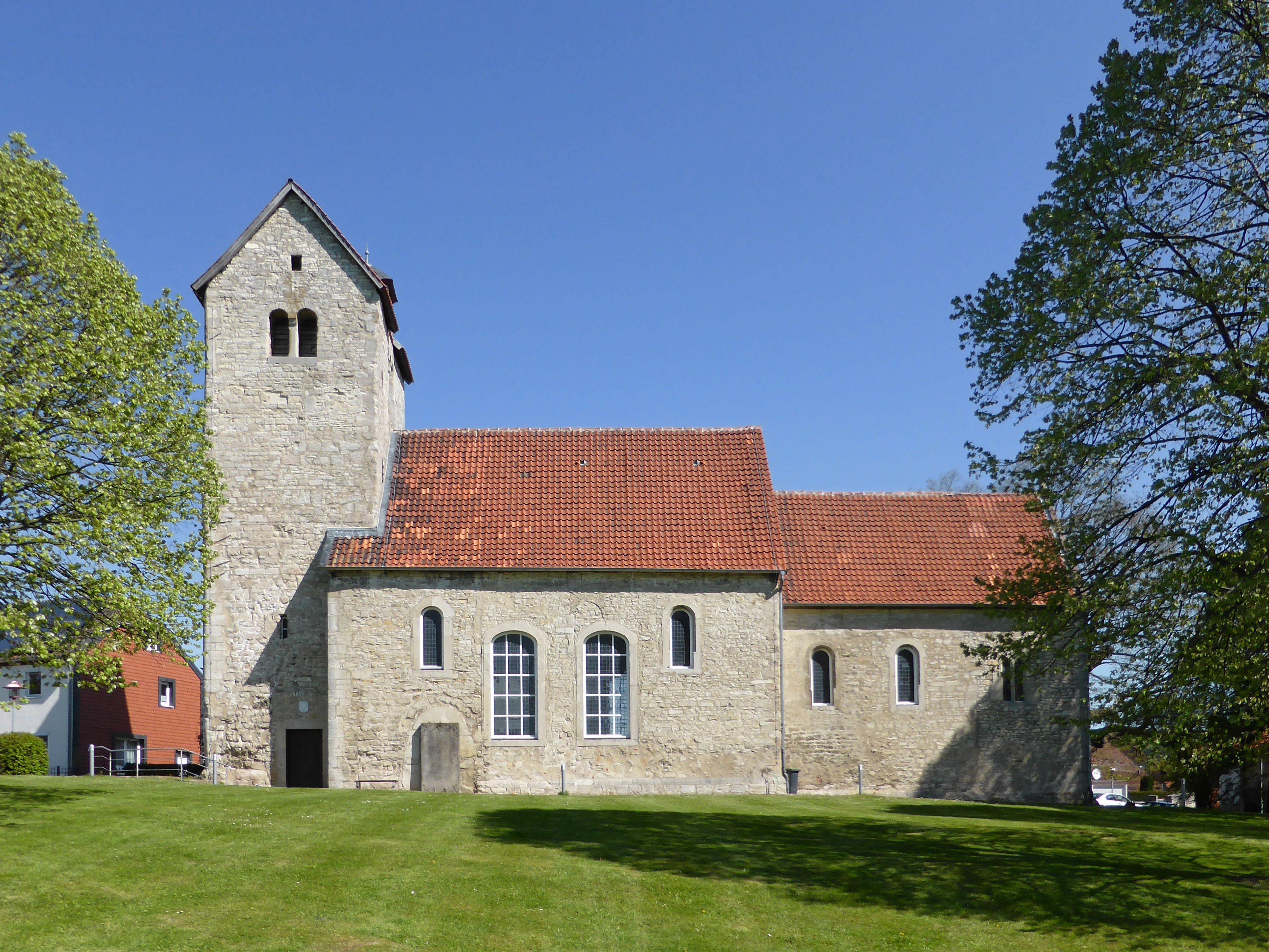 Evangelisch-lutherische Kirche St. Johannes Baptista in Evessen, Lkr., Wolfenbüttel.